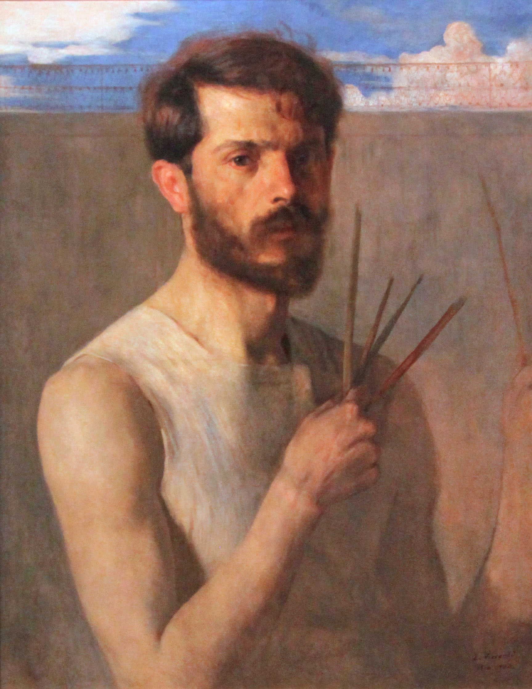 Pintura Autorretrato de Eliseu Visconti, 1902, Óleo sobre tela, 64 x 48 cm, Coleção Visconti-Hirth, Rio de Janeiro, RJ.